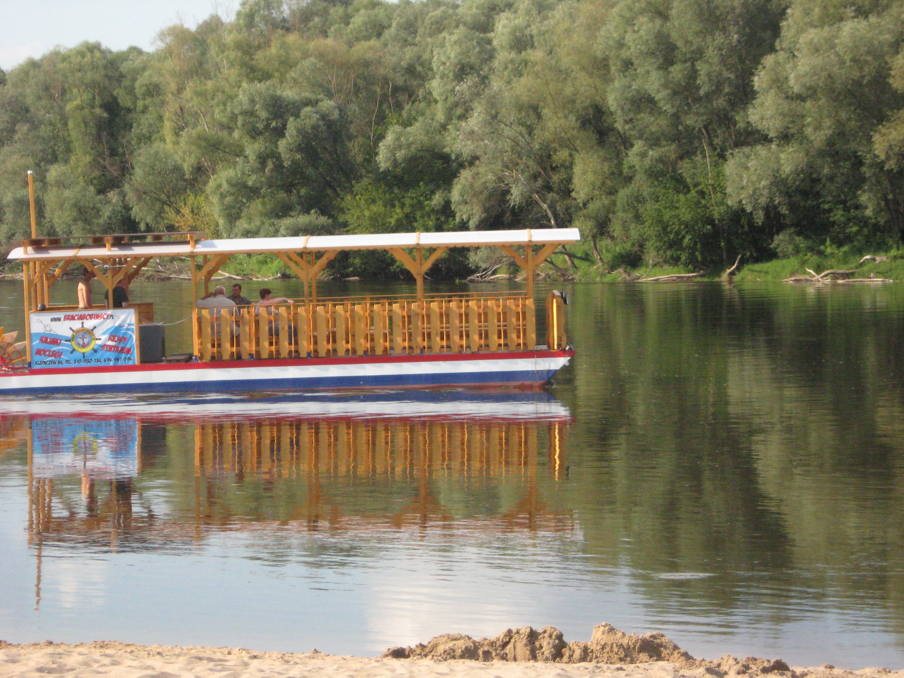 Statek wycieczkowy na Bugu w Serpelicach